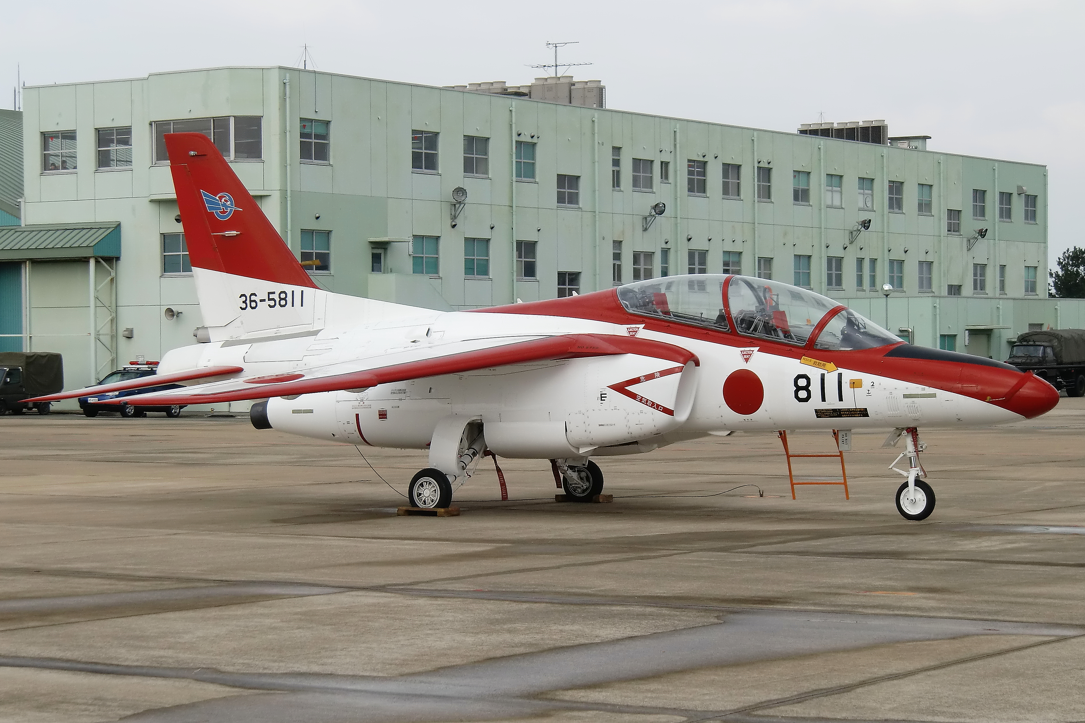 航空自衛隊 川崎 T-4 芦屋基地